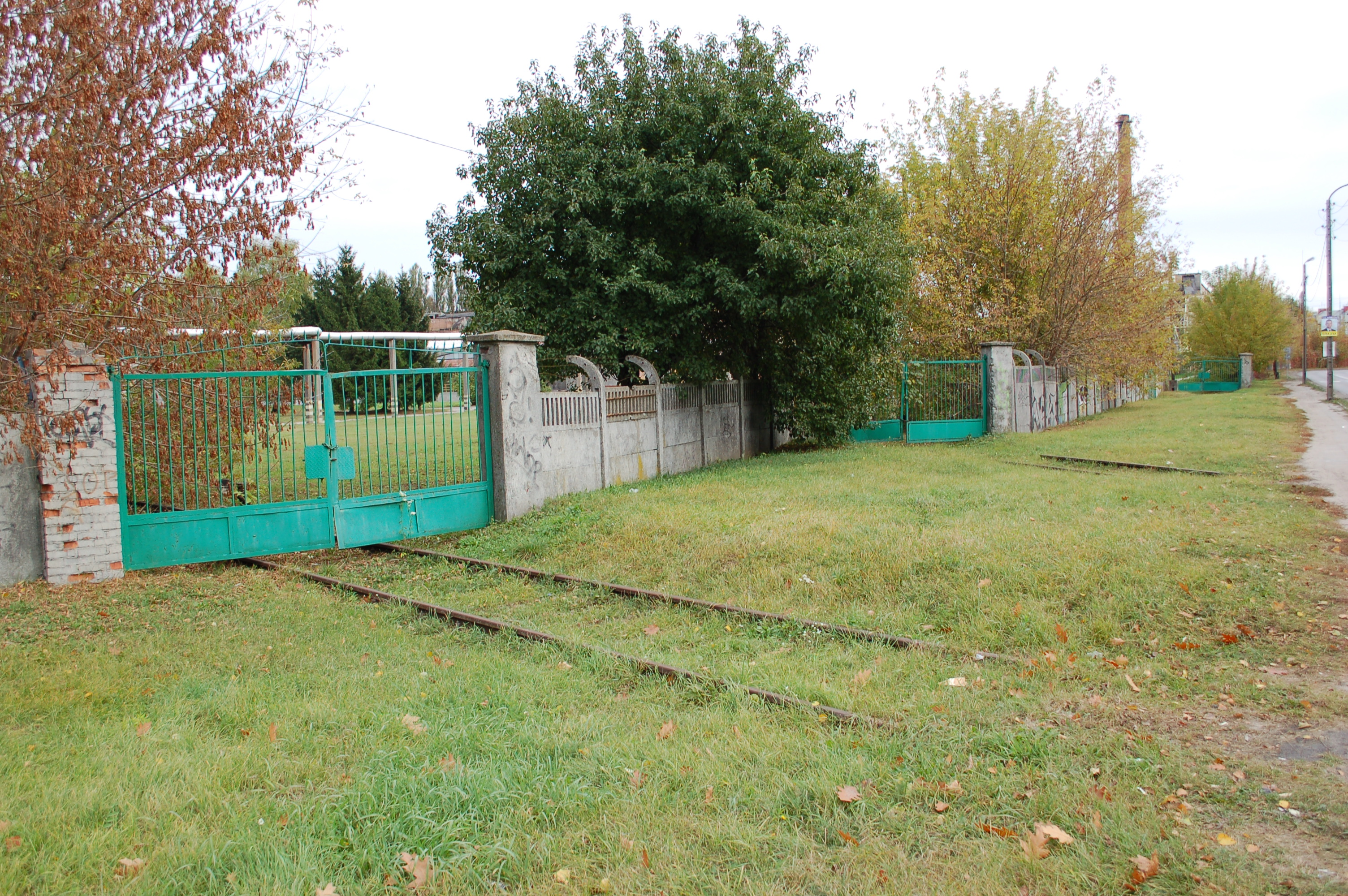 Papierfabrik Konstancin-Jeziorna, Konstans Sp.z o.o. (Metsä-Tissue), frühere Bahnanschlüsse